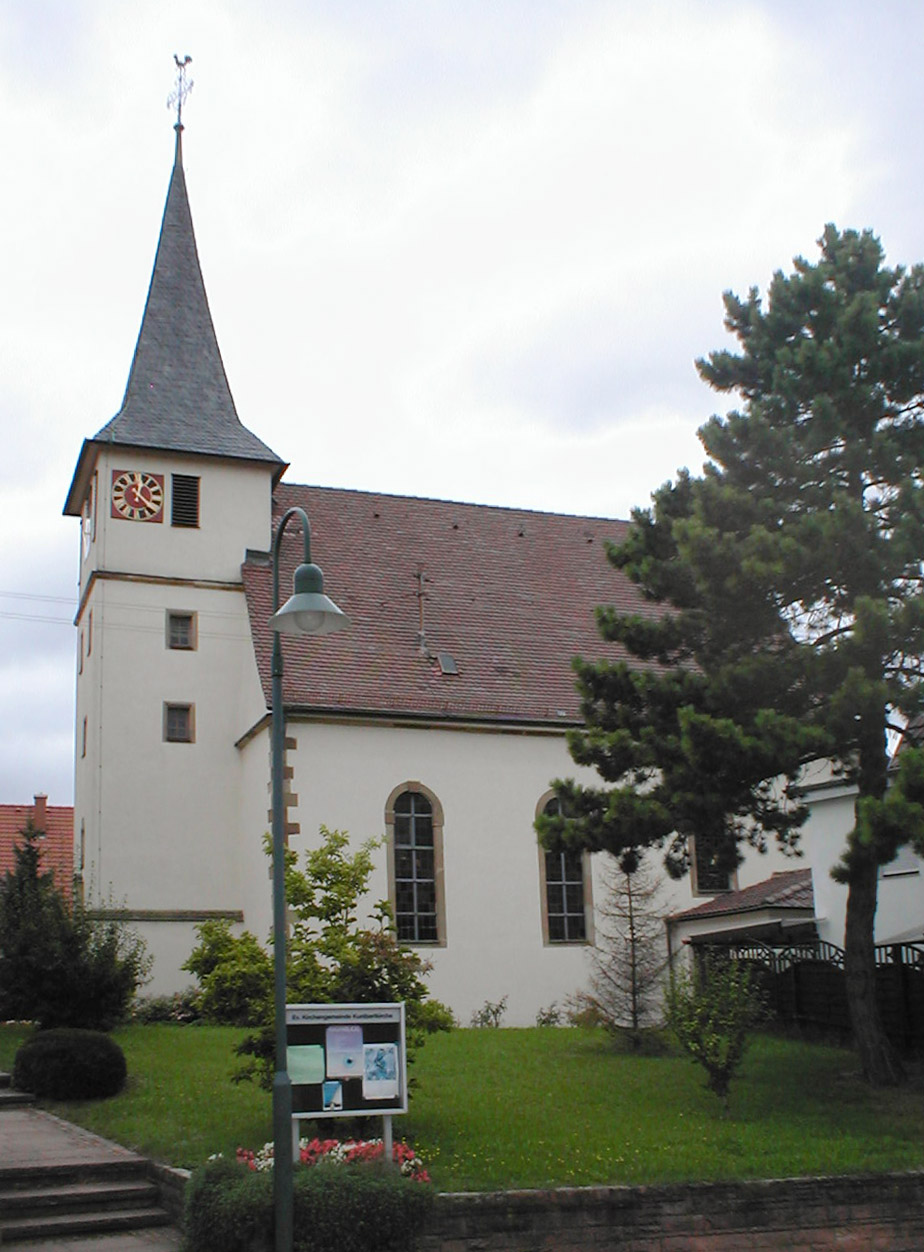 Evangelische Kunibertkirche in Untereisesheim, Turm aus dem 16. Jhd., Langhaus errichtet 1738